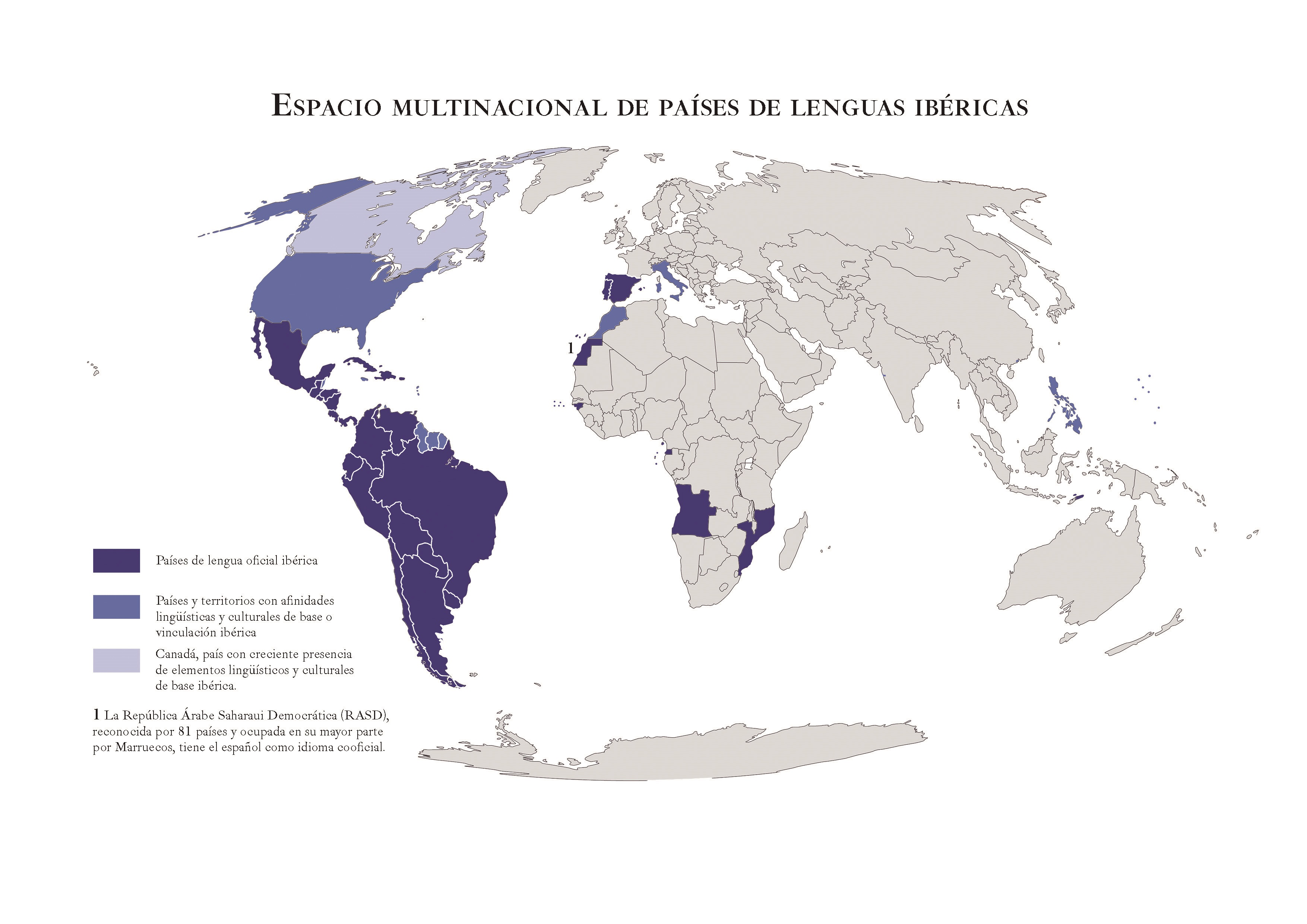 Mapa espacio multinacional de países de lenguas ibéricas